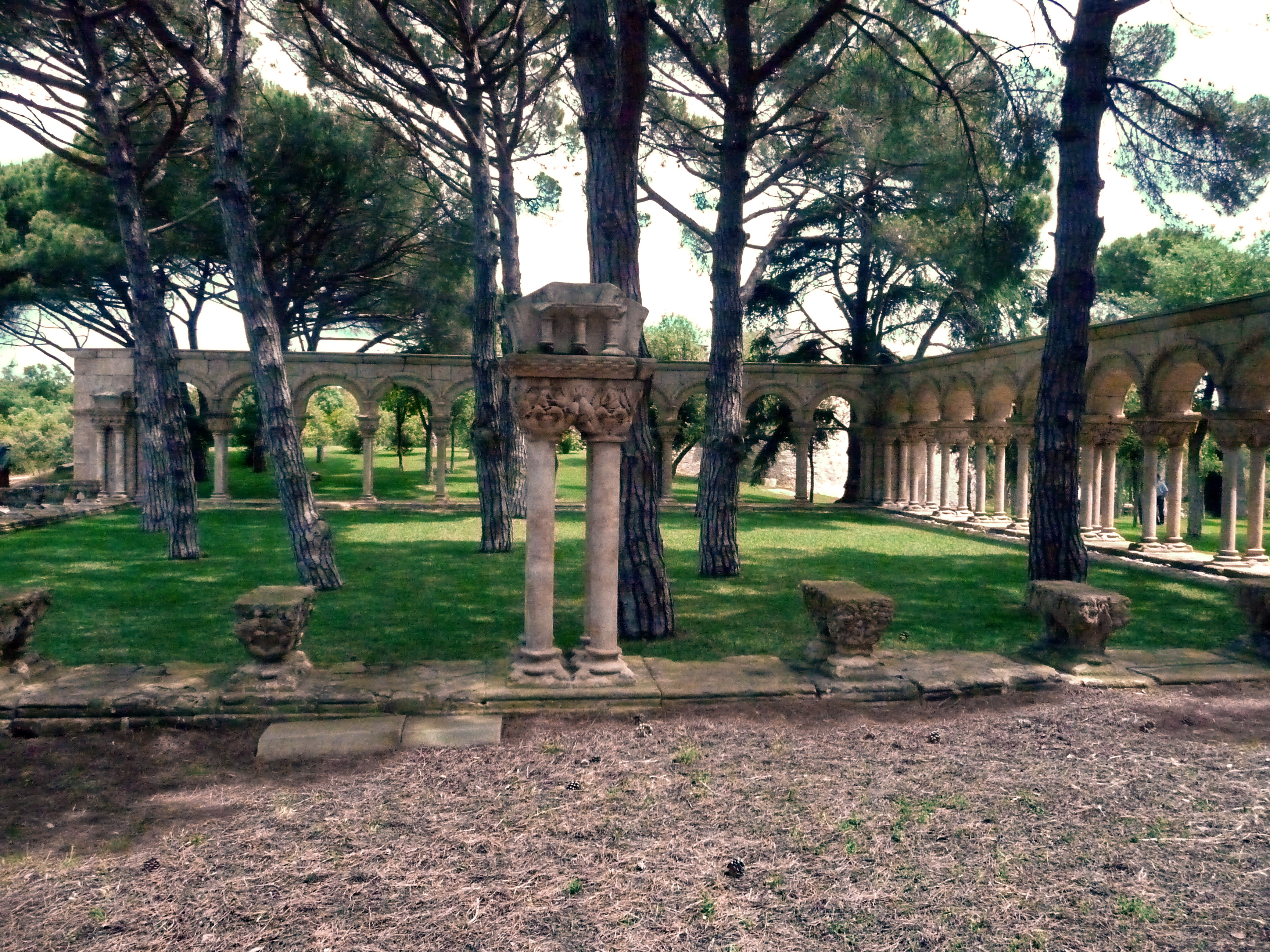 Claustre romànic del Mas del Vent de Palamós